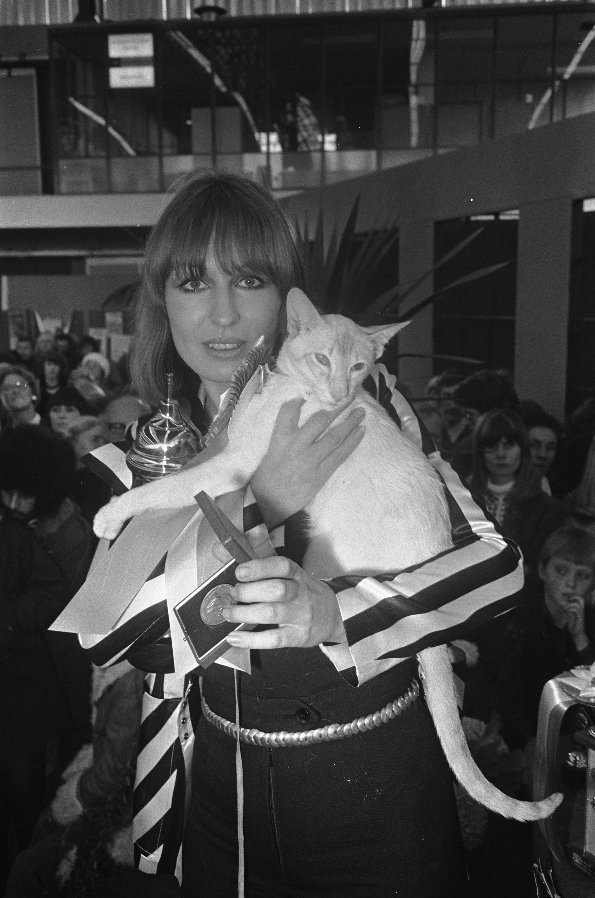 Collectie / Archief : Fotocollectie Anefo Reportage / Serie : [ onbekend ] Beschrijving : Inter-Kat 1973 in de RAI, Liesbeth List met mooiste kat Datum : 21 oktober 1973 Persoonsnaam : List, Liesbeth Fotograaf : Croes, Rob C. / Anefo Auteursrechthebbende : Nationaal Archief Materiaalsoort : Negatief (zwart/wit) Nummer archiefinventaris : bekijk toegang 2.24.01.05 Bestanddeelnummer : 926-7614